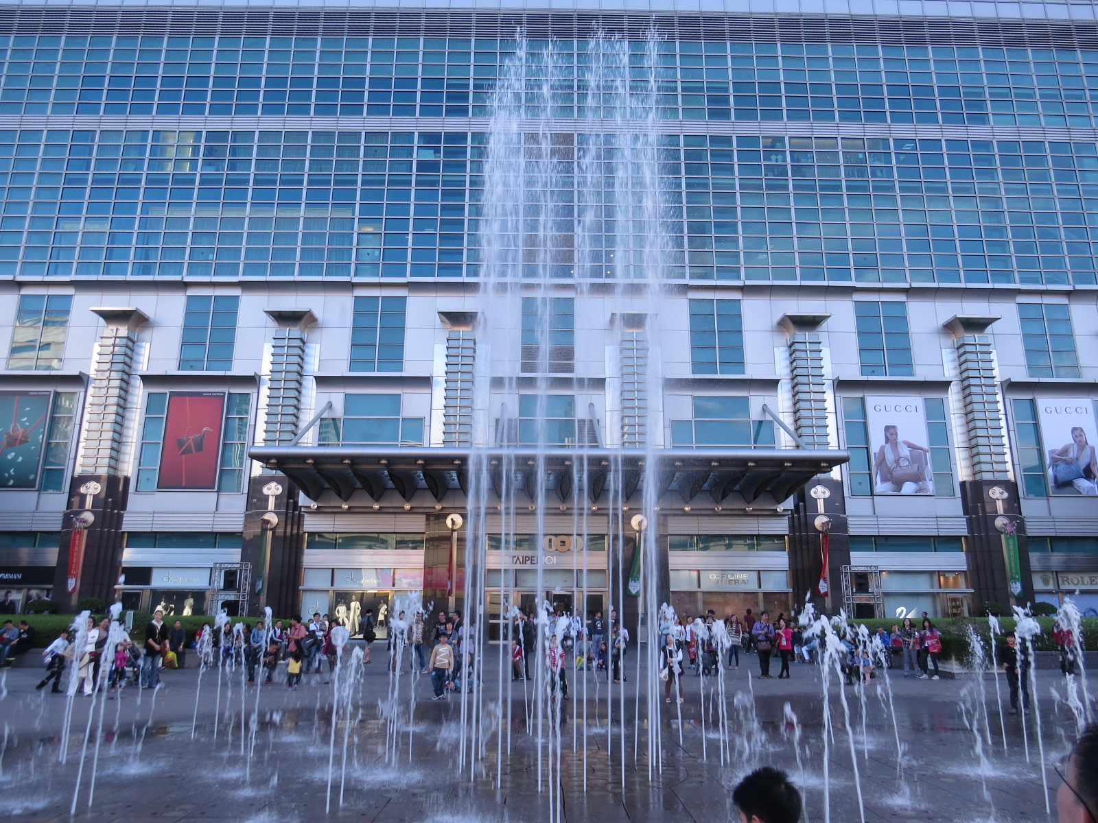 中文（台灣）: 台北101公共藝術：「龍躍雲端」噴泉。